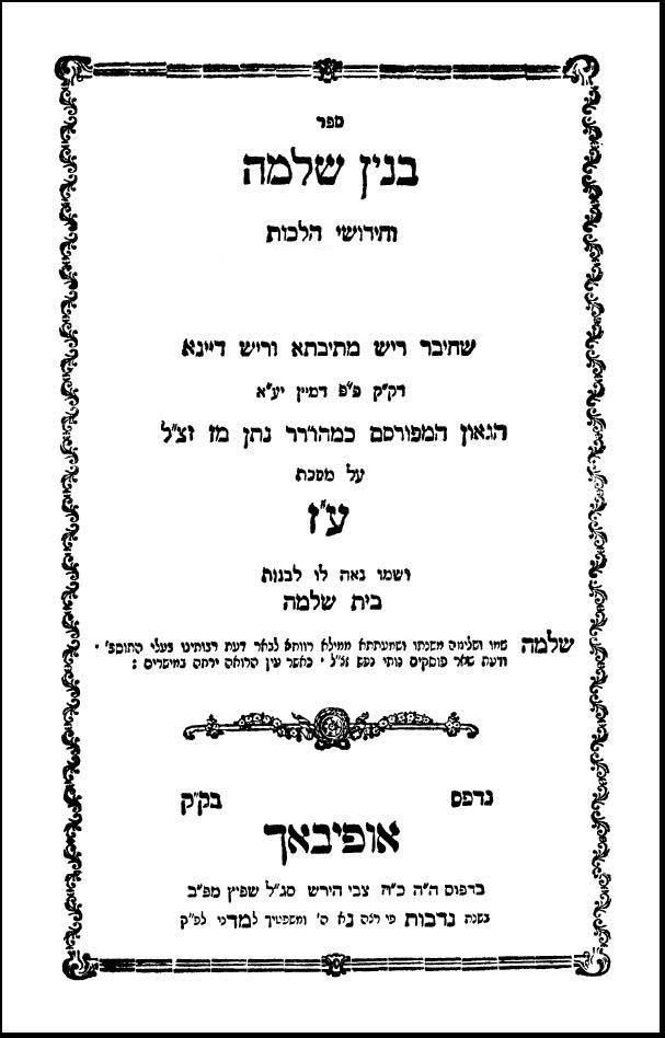 כריכת ספר בנין שלמה לרבי נתן מז